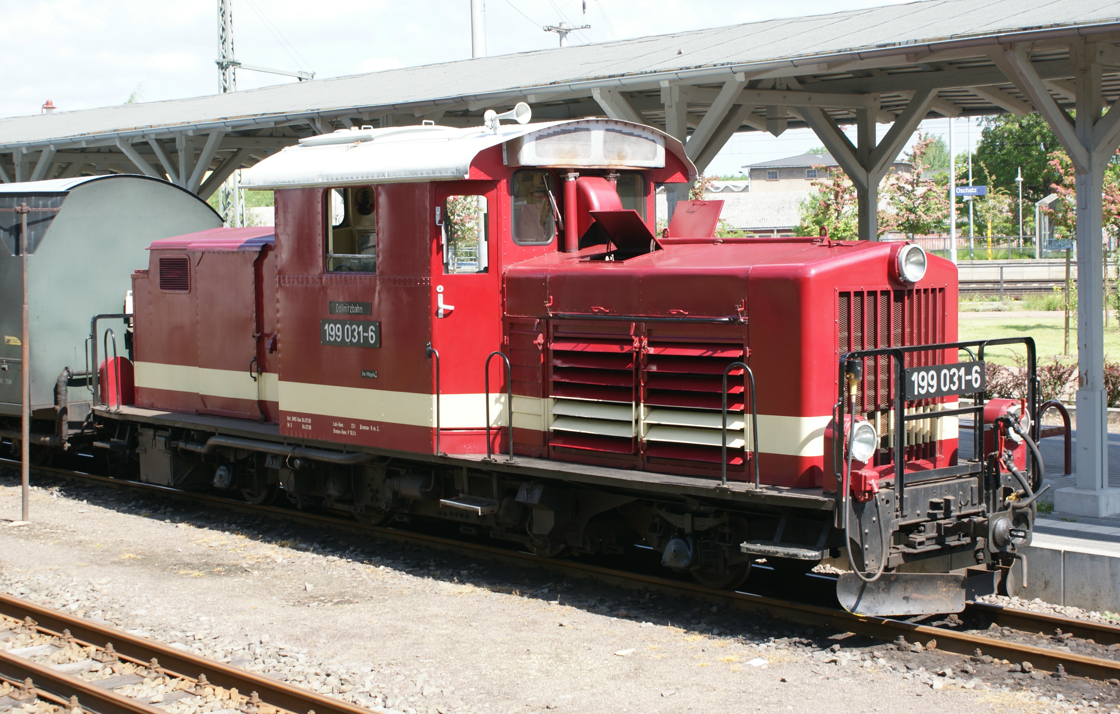 Diesellokomotive 199 031 der Döllnitzbahn in Oschatz 04.Juni 2010